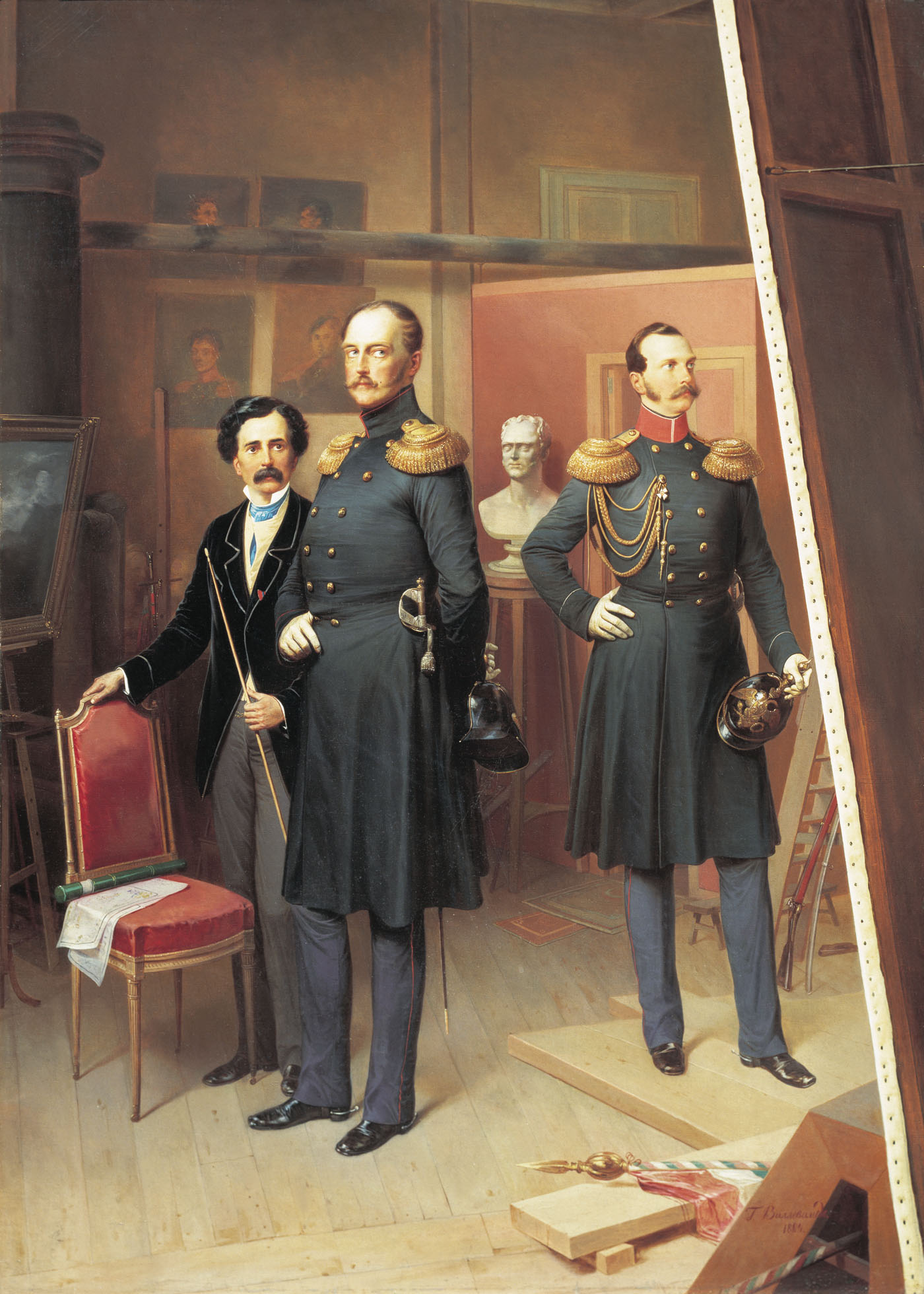 Виллевальде Богдан Павлович. Николай I с цесаревичем Александром Николаевичем в мастерской художника в 1854 году (1884)